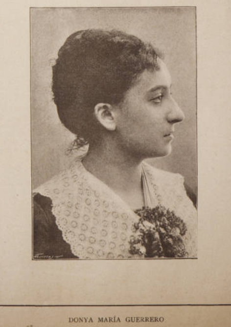 La Ilustració Catalana, número 264 15 Juliol de 1891 pàg. 193